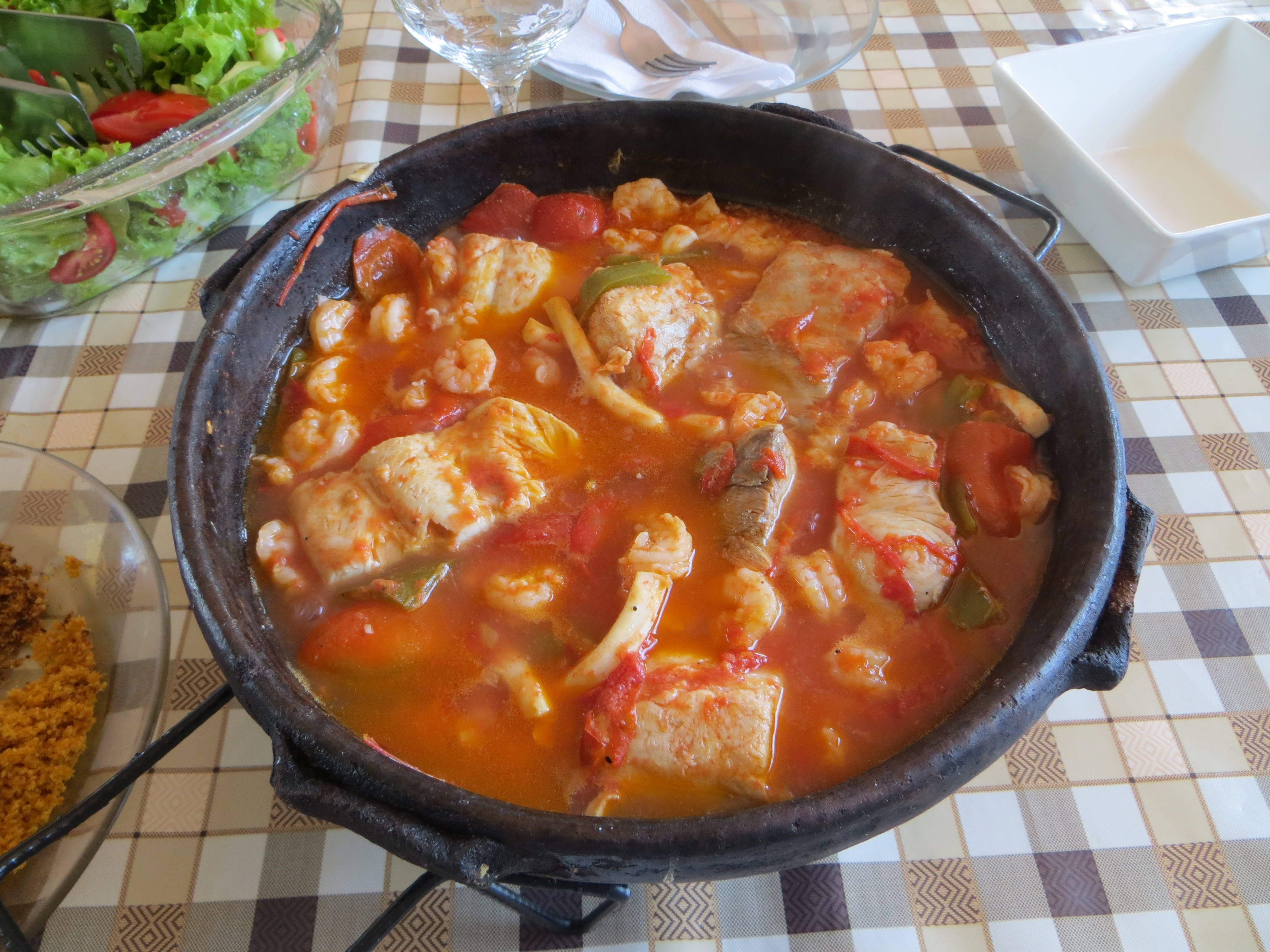 Moqueca capixaba, prato típico do estado brasileiro do Espírito Santo.